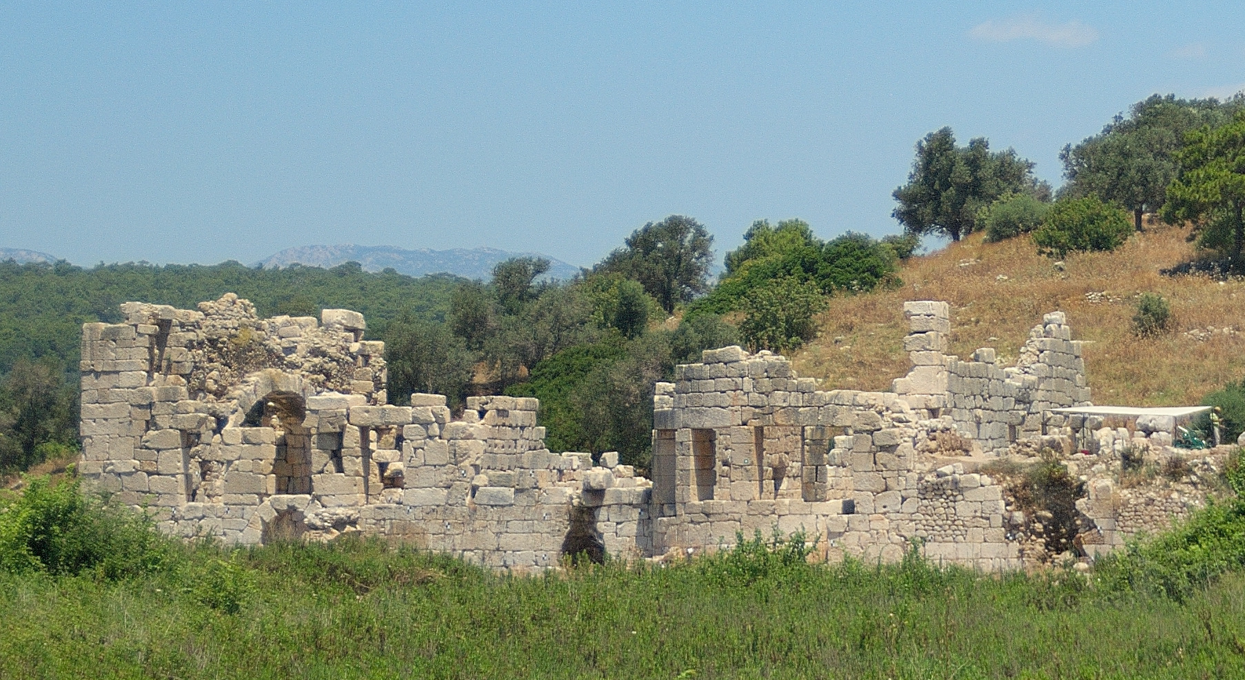 Патара. Византийская церковь